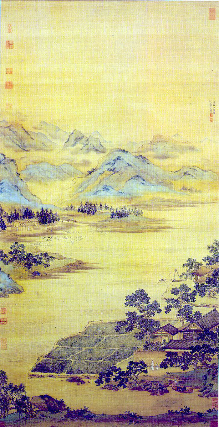 [明] 仇英 莲溪渔隐图 (Fisherman Hermit by Qiu Ying 1494-1552) 立轴绢本设色 纵126.5厘米 横66.3厘米 现藏北京故宫博物院 (Located in the Palace Museum in Beijing) 来自